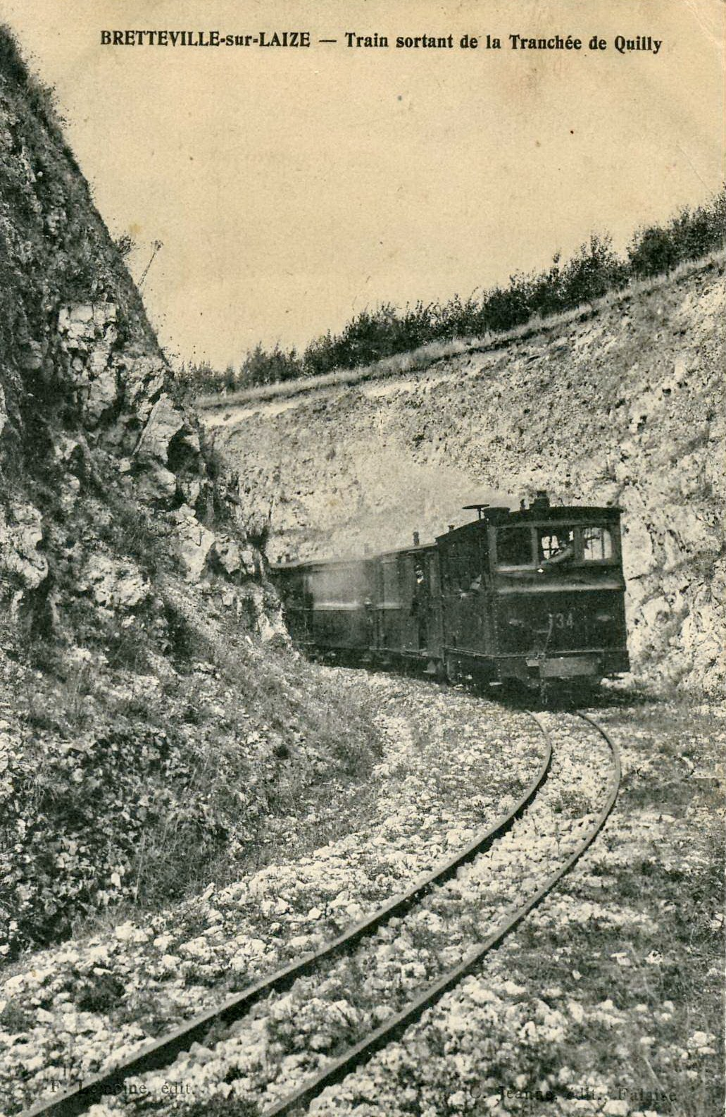 Carte postale ancienne éditée par Jeanne, éditeur à Falaise : BRETTEVILLE-SUR-LAIZE - Tram sortant de la Tranchée de Quilly